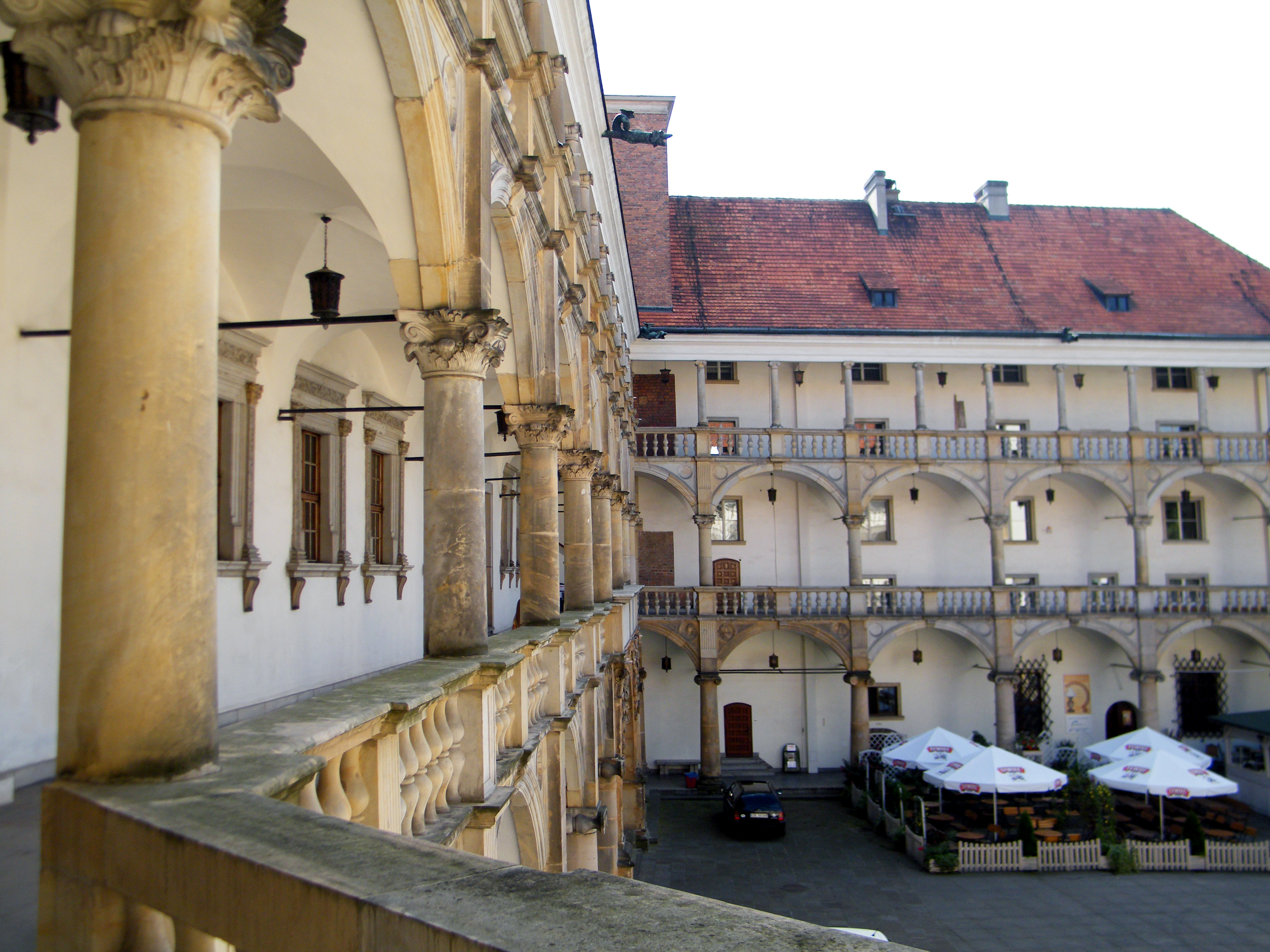 Zamek. Brzeg